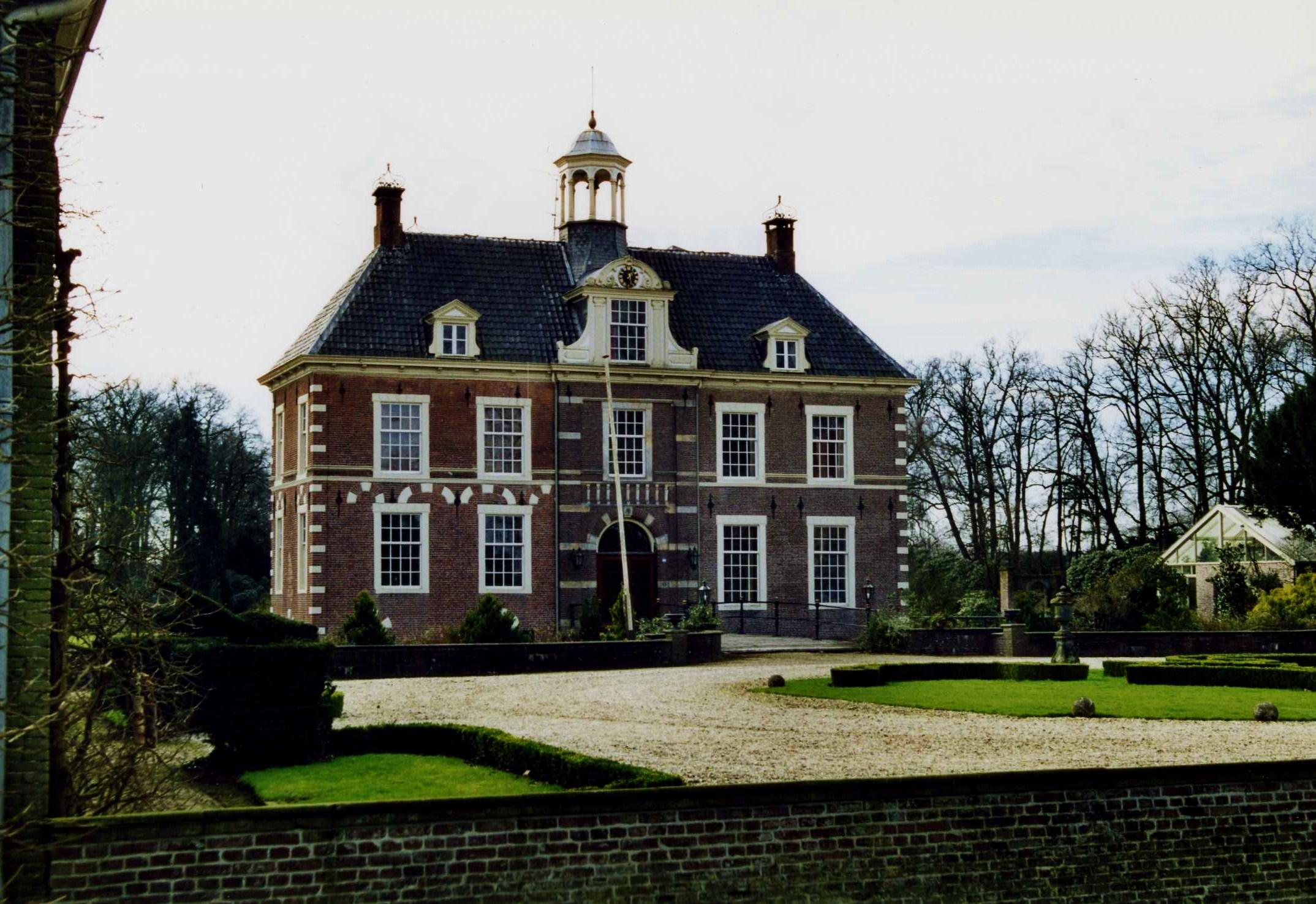 Kasteel 't Warmelo te Diepenheim.